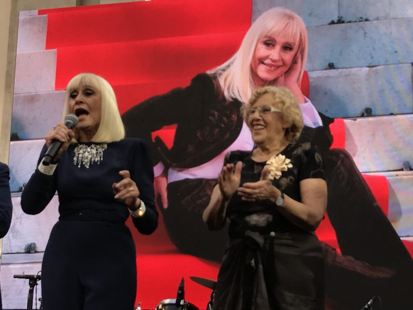 Dos países unidos por muchos rasgos comunes, Italia y España. Por primera vez, la Fiesta de la República, día nacional en Italia, se abre a todos los madrileños con una celebración que ha arrancado la tarde del 2 de junio y concluirá el domingo 4 de junio. Manuela Carmena, alcaldesa de Madrid, y Stefano Sannino, embajador del país casi vecino, acudieron este viernes al patio central del Conde Duque, reconvertido en una auténtica piazza italiana, para adentrarse en la cultura, la música, la gastronomía y el diseño, uno de los puntos fuertes italianos y que sirve de hilo conductor al programa del fin de semana, y también de nexo entre los diseñadores italianos y madrileños.